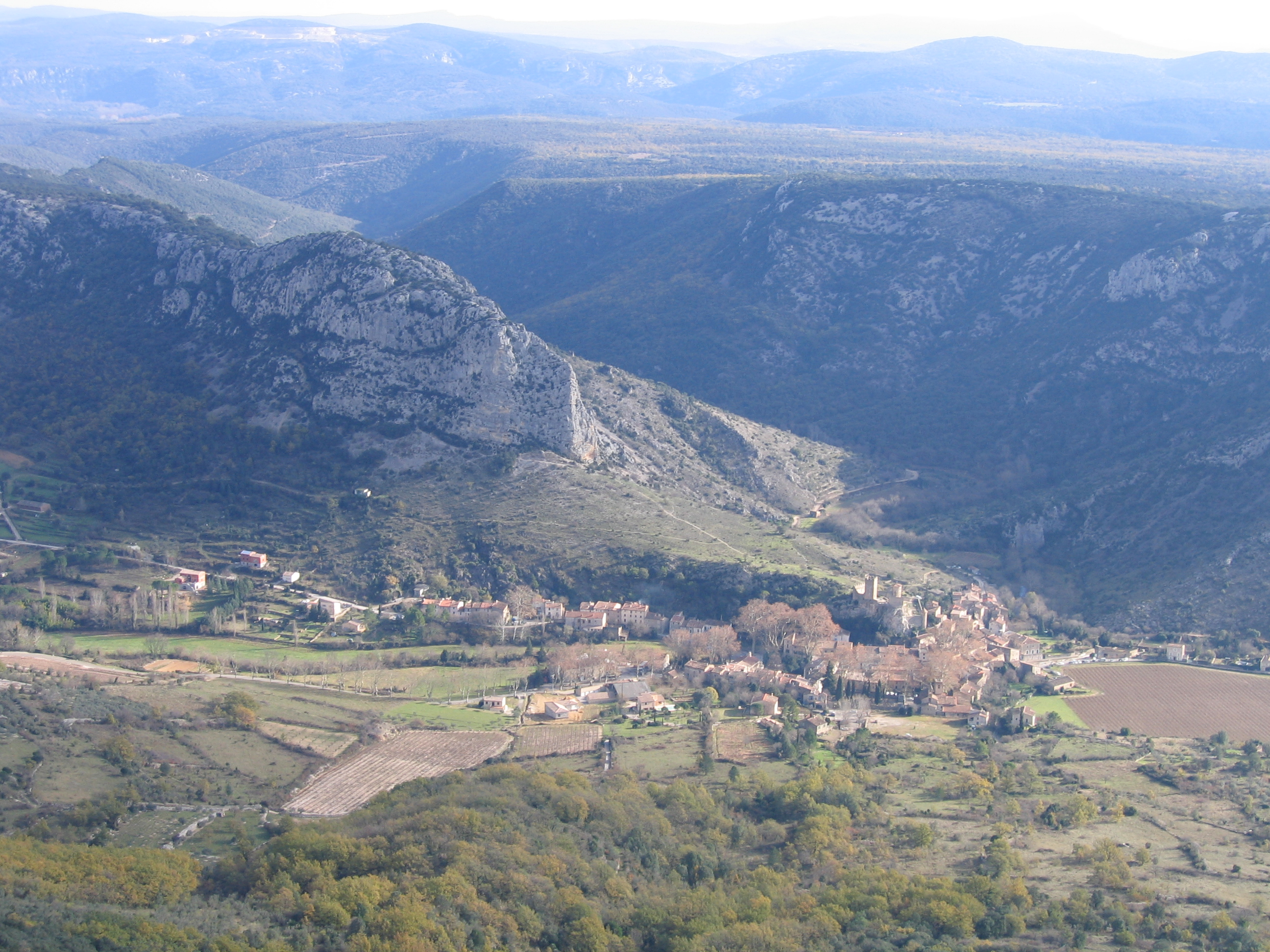 Description: Village de Saint-Jean-de-Buèges, au coeur de la vallée de la Buèges, au pied du massif de la Séranne. Hérault, France. Source: Hugo Soria Licence: GFDL Hugo Soria